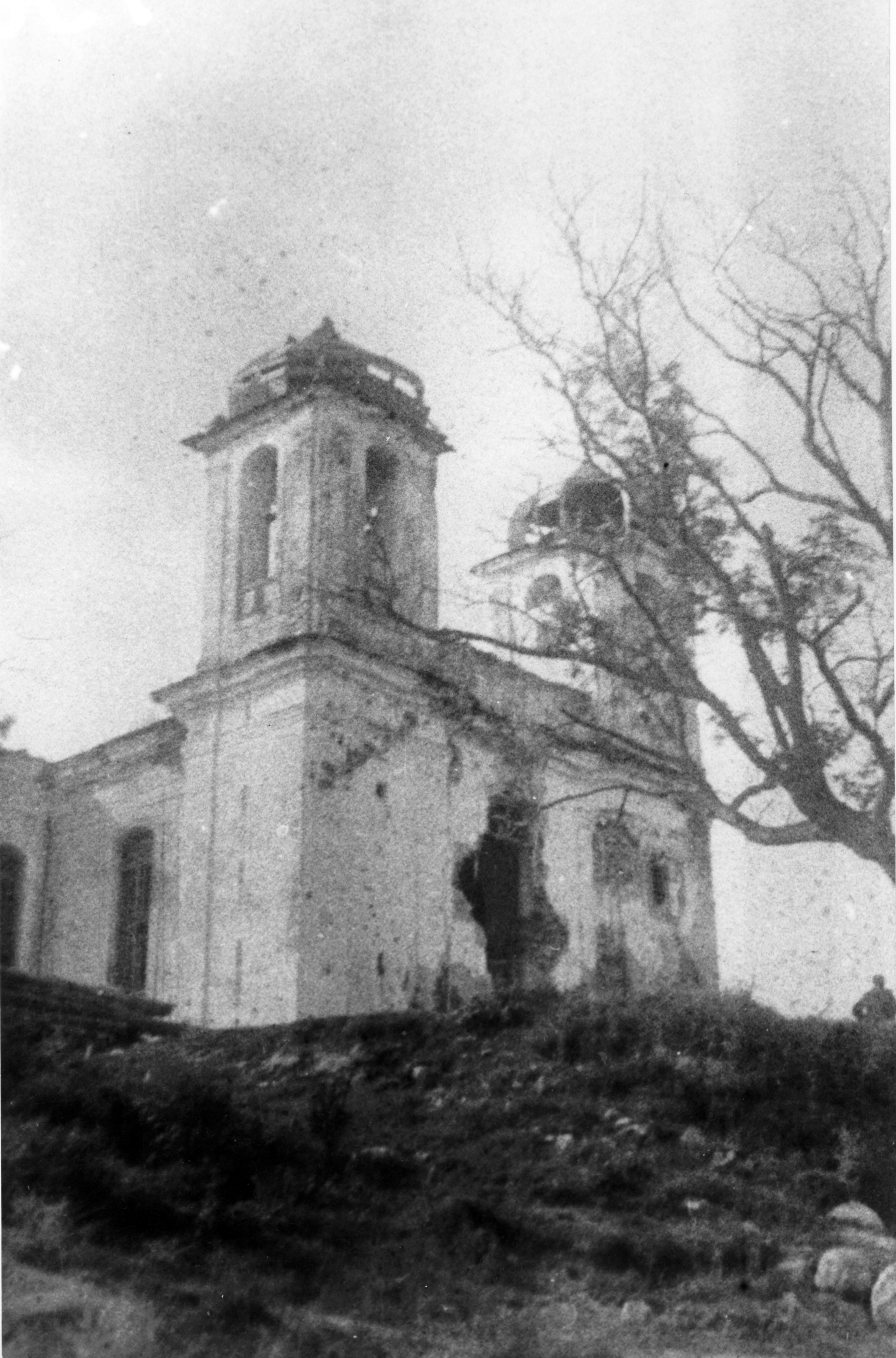 Беларуская (тарашкевіца): Полацак (Połacak), Задзьвіньне (Zadźvińnie). Касьцёл і кляштар бэрнардынаў